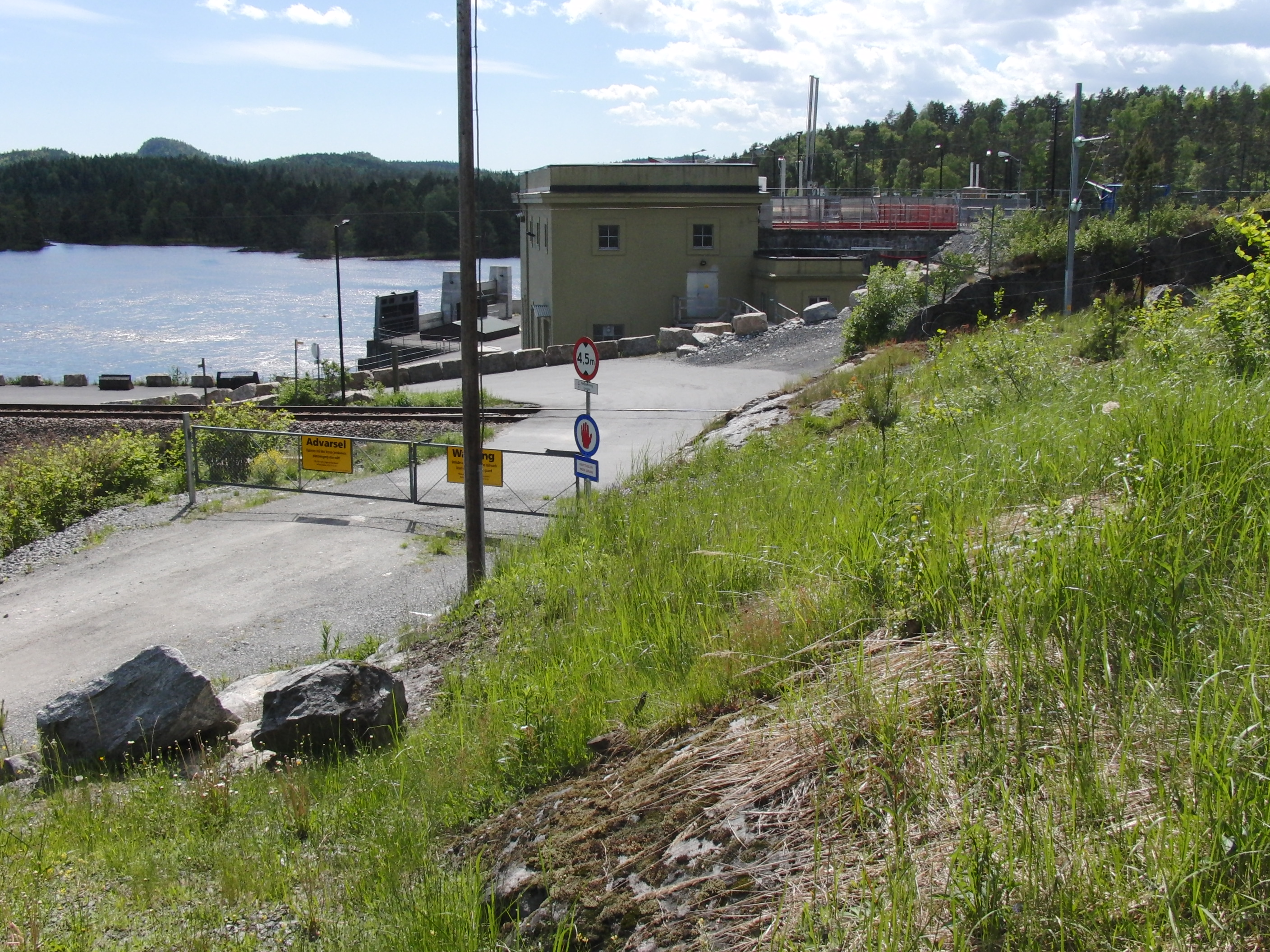 Flatenfoss kraftverk